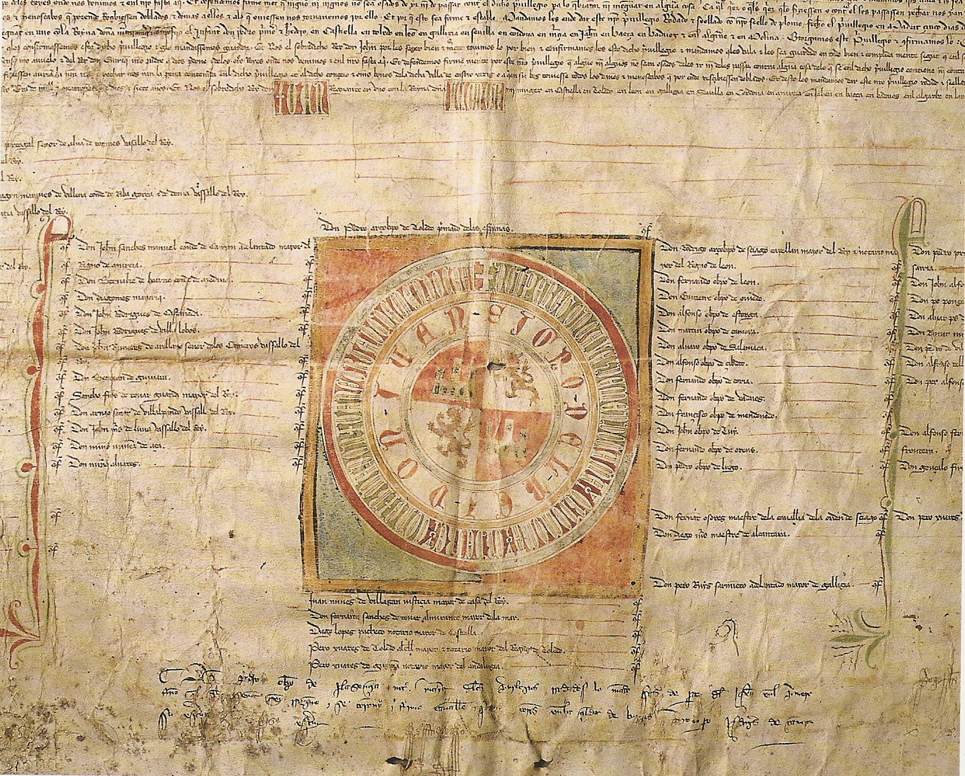 Privilegio rodado del rey Juan I de Castilla (1358-1390), confirmando el Fuero de Castrojeriz.